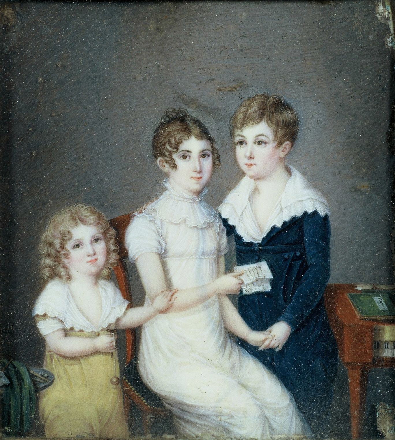 Pauline, Saint-Hilaire et Louis Reynaud (ca 1812) lors de la captivité de leur père en Angleterre